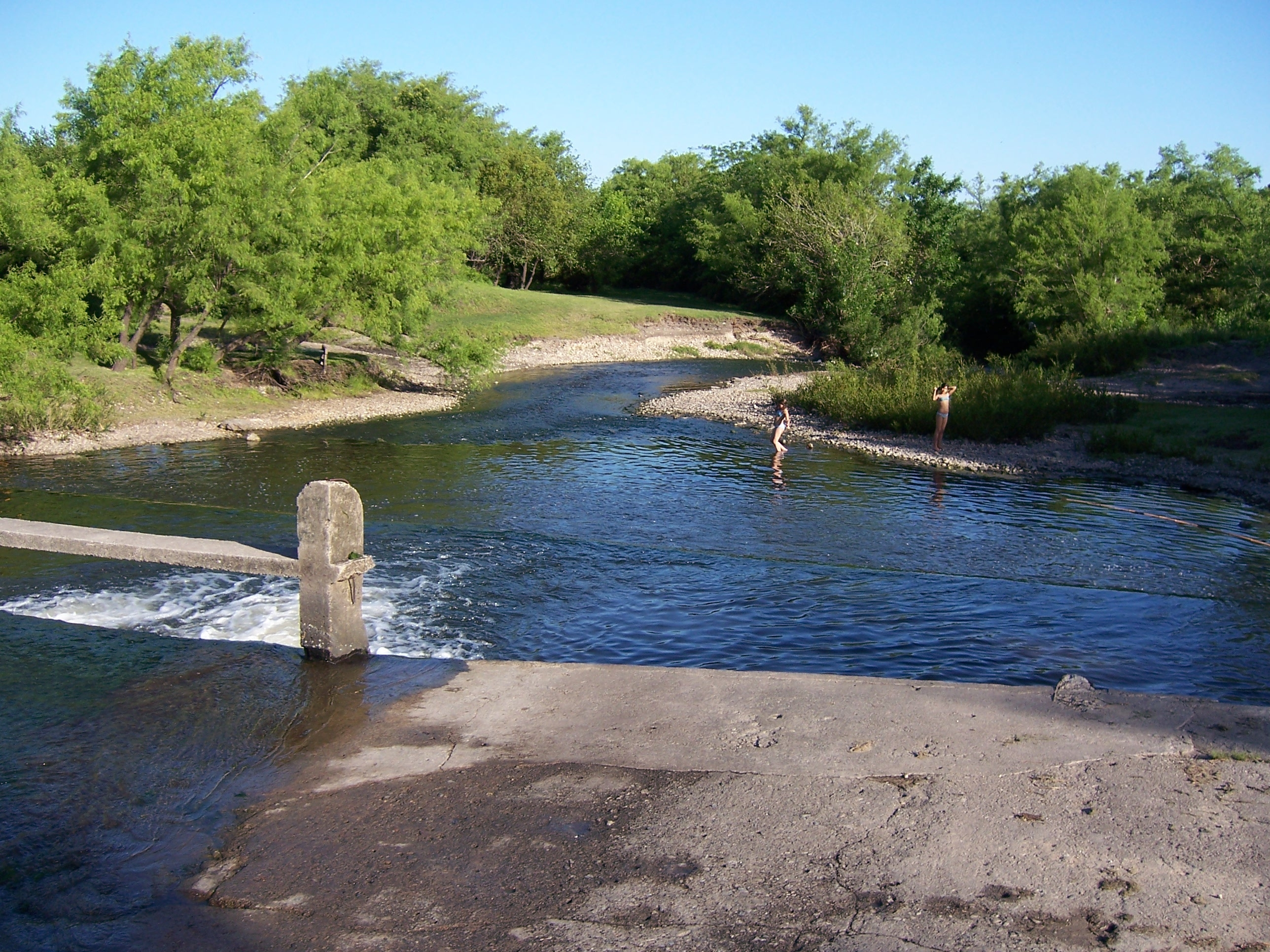 Paso Arbeche, próximo a la ciudad de Rosario, Departamento de Colonia, Uruguay.